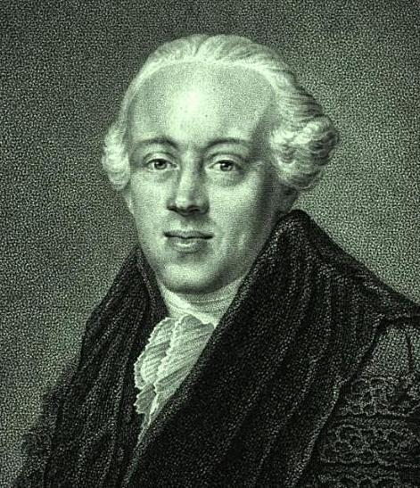 Jan Frederik van Beeck Calkoen (1772–1811)